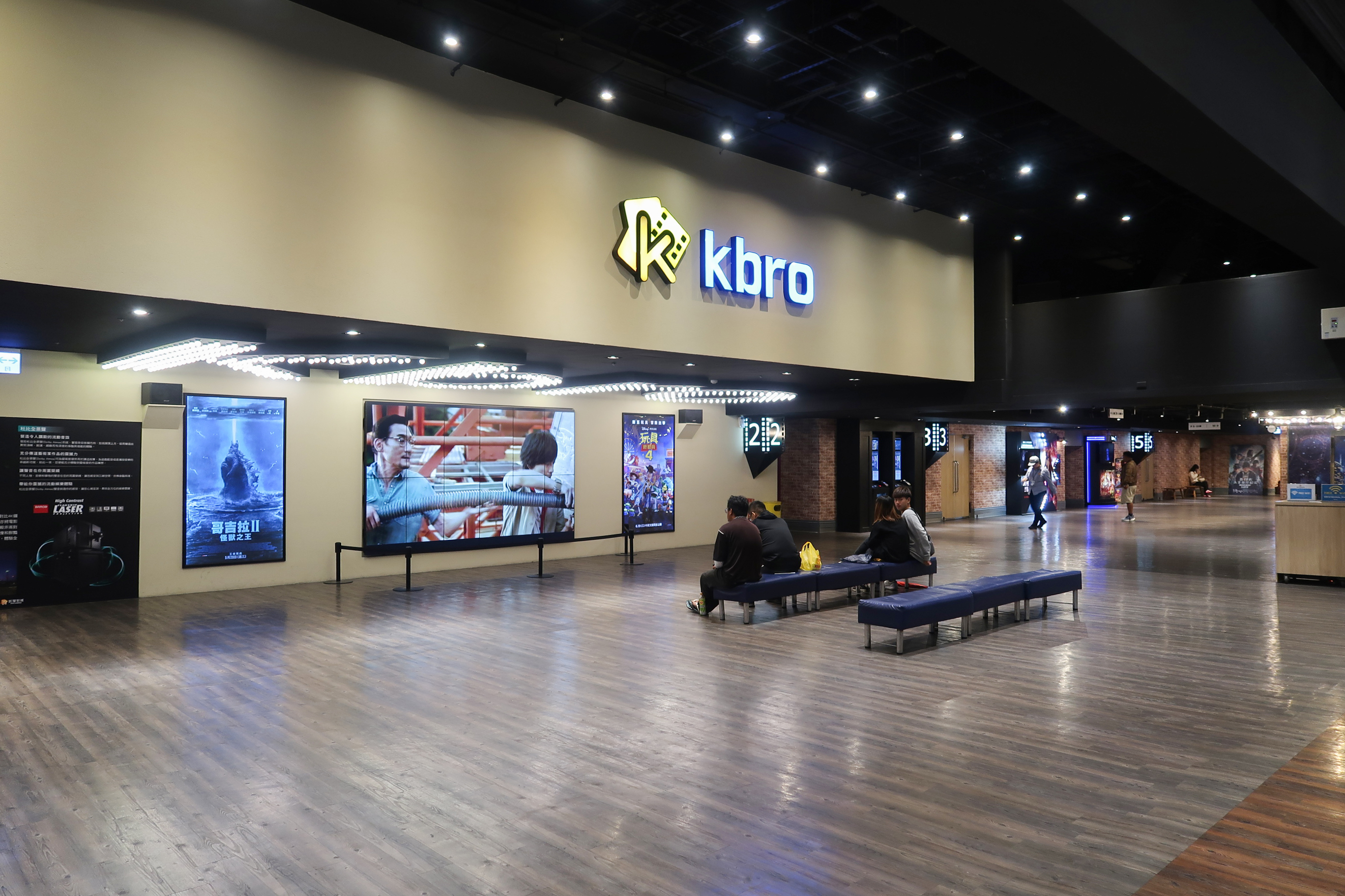 中文（台灣）: 大魯閣新時代購物中心4樓凱擘影城。